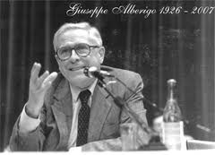 Giuseppe Alberigo foto